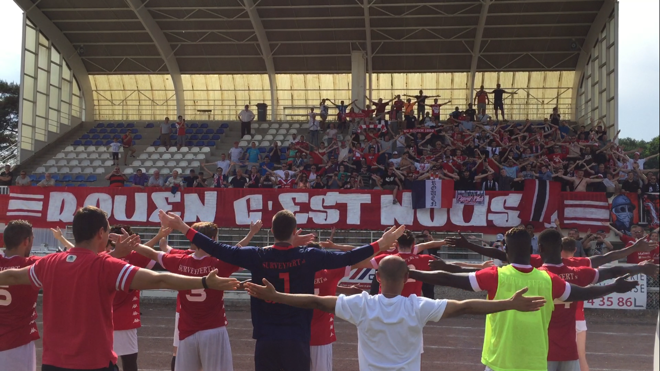 Clapping entre les joueurs et les supporters du FCR à l'issue de la dernière journée de DH Normandie FCR - Bois-Guillaume qui s'est déroulée à Oissel, le 28 mai 2017.